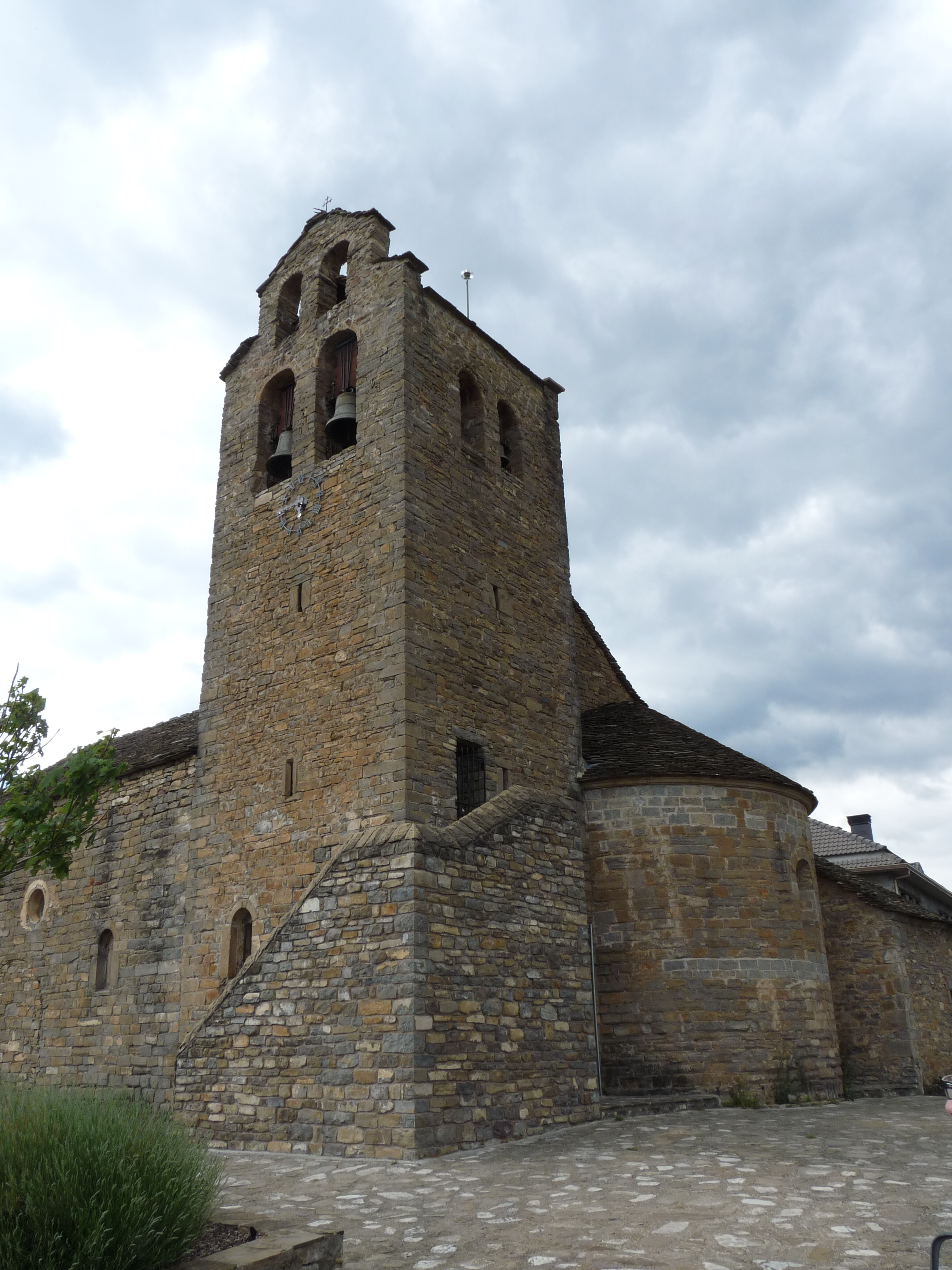 Castiello de Jaca - Iglesia San Miguel Arcángel (s. XII al XVII) - Torre y lateral